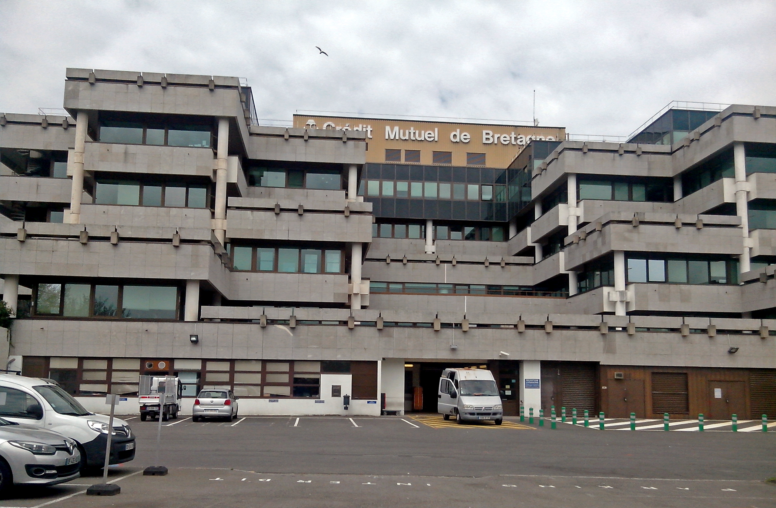 Siège du Crédit Mutuel de Bretagne, face à la rade de Brest.